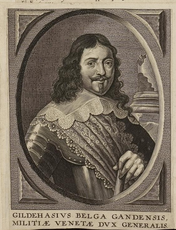 Grafik aus dem Klebeband Nr. 1 der Fürstlich Waldeckschen Hofbibliothek Arolsen Motiv: Gil de Haes, Generalwachtmeister im Dreißigjährigen Krieg; 1649–53 venezian. Obergeneral Authority control GND: 101972806X